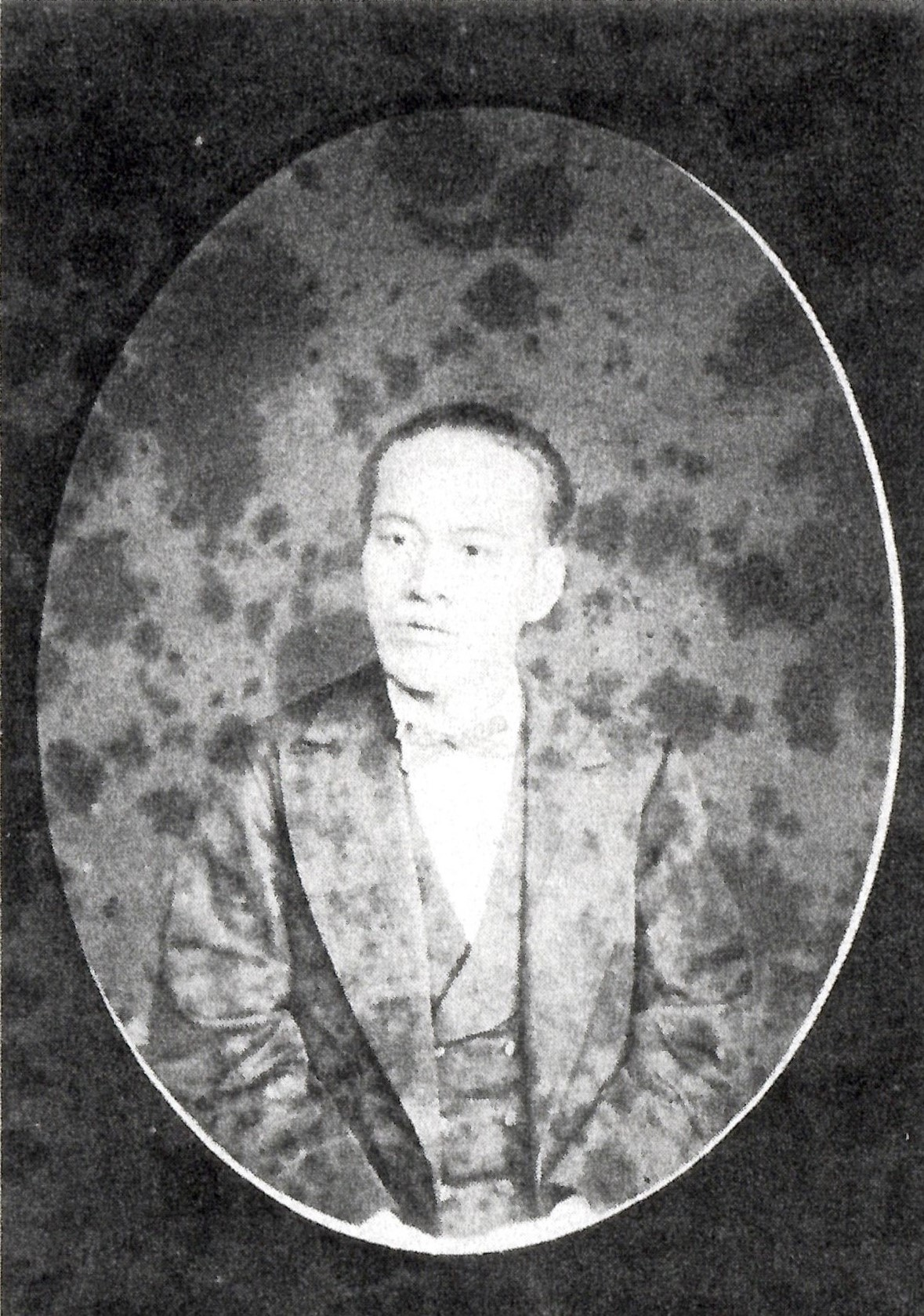 長谷信成の肖像写真。